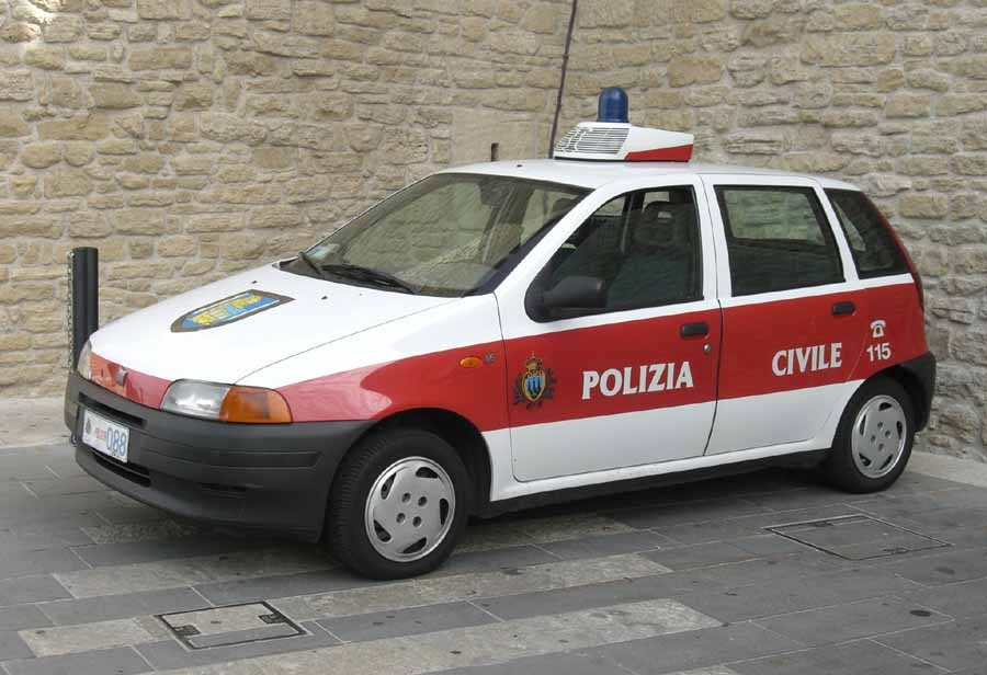 Fiat Punto Polizia Civile